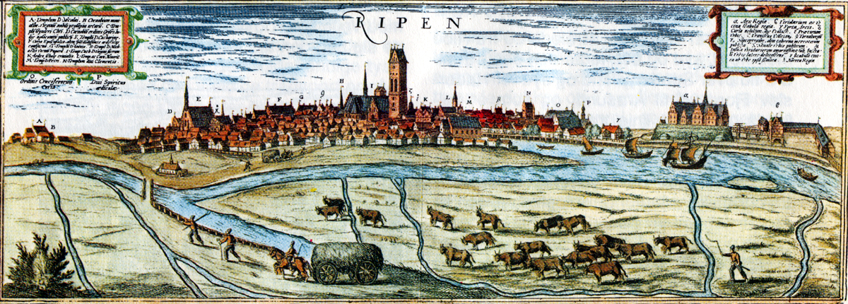 Ribe, Denmark.